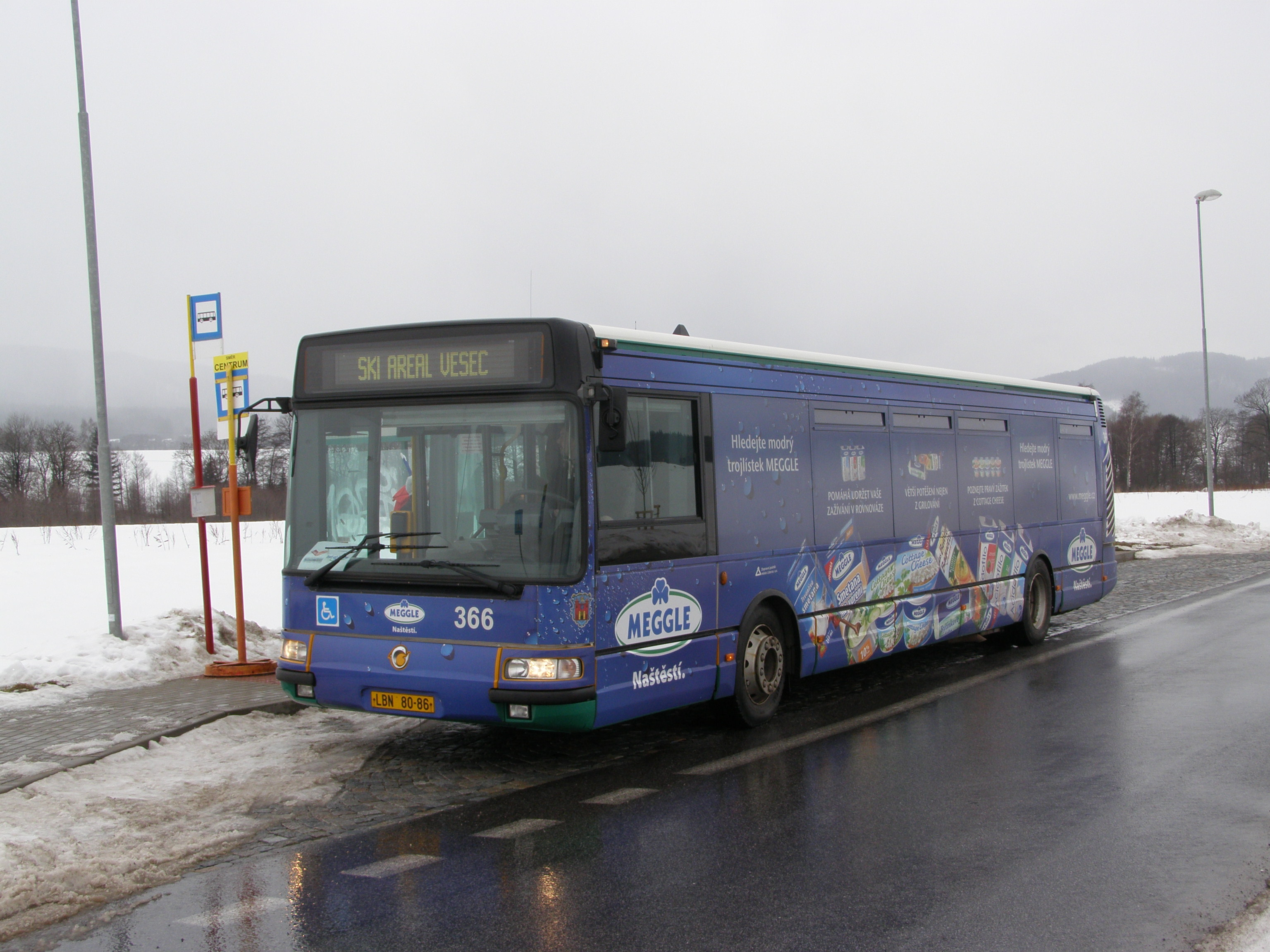 Průmyslová zóna sever